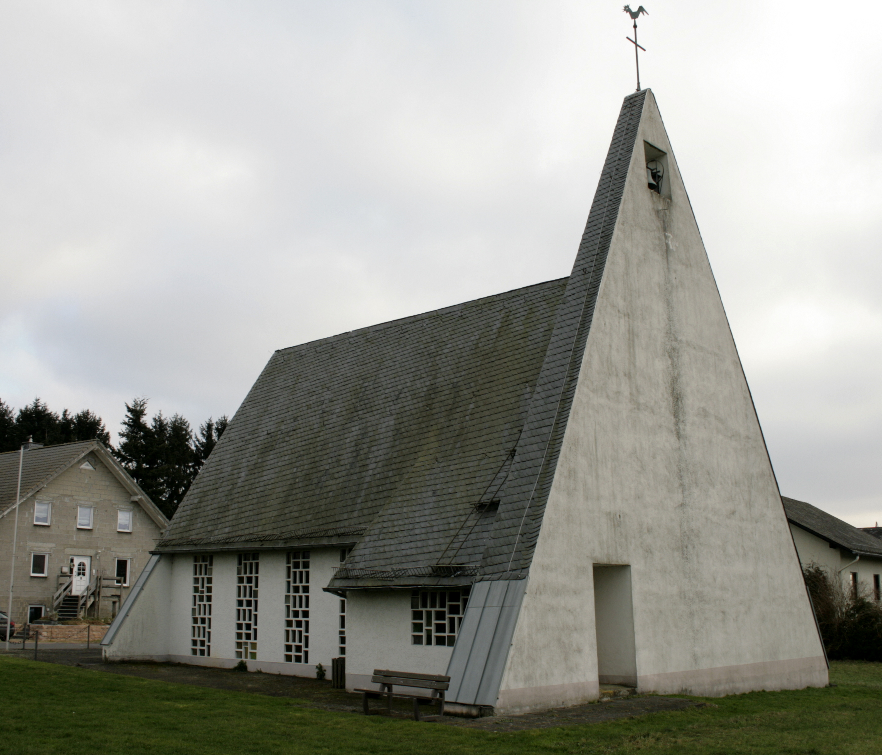 Kirche in Hadamar-Niederweyer, Deutschland